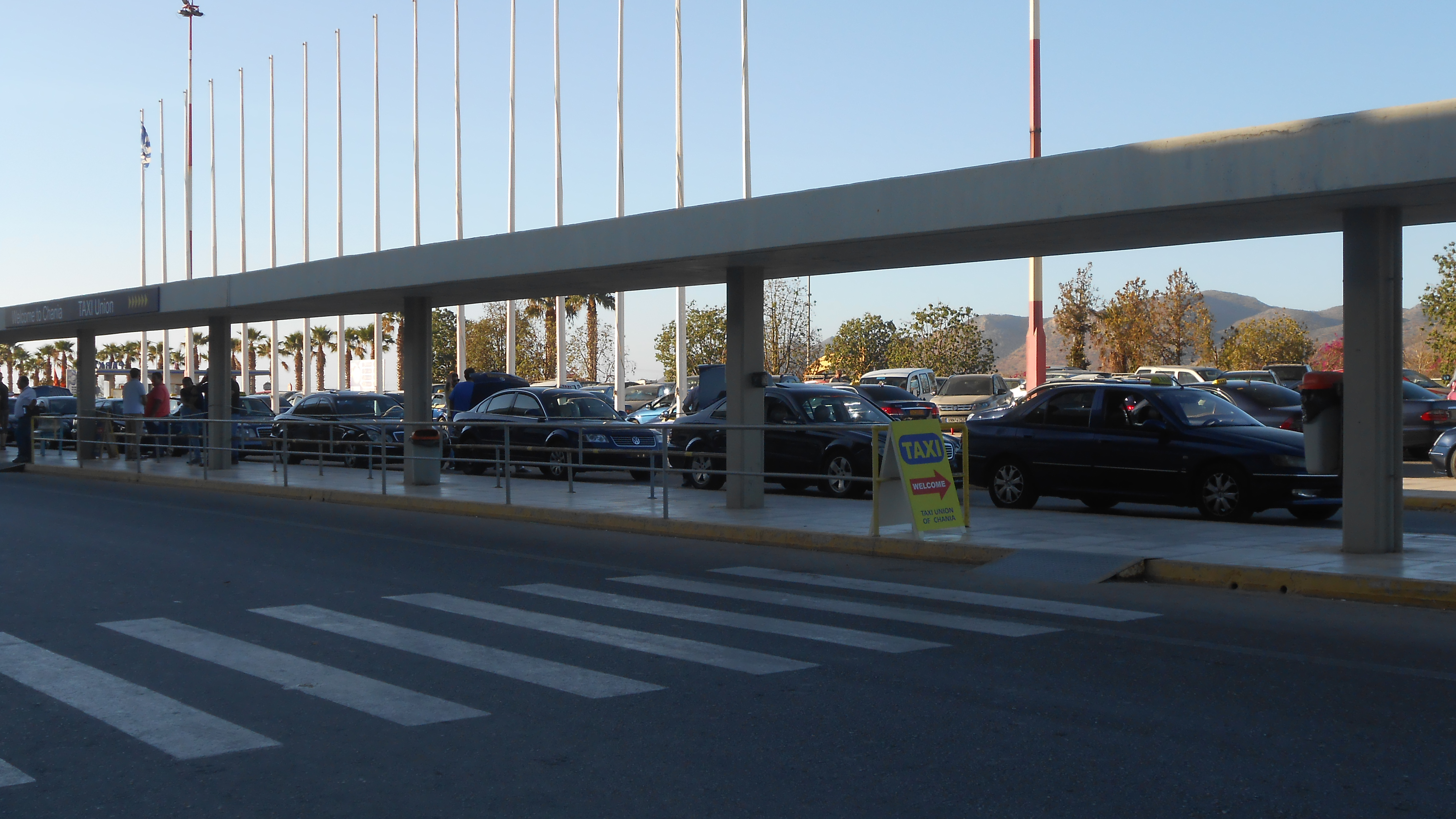 Taxistand vor dem Flughafen Chania.